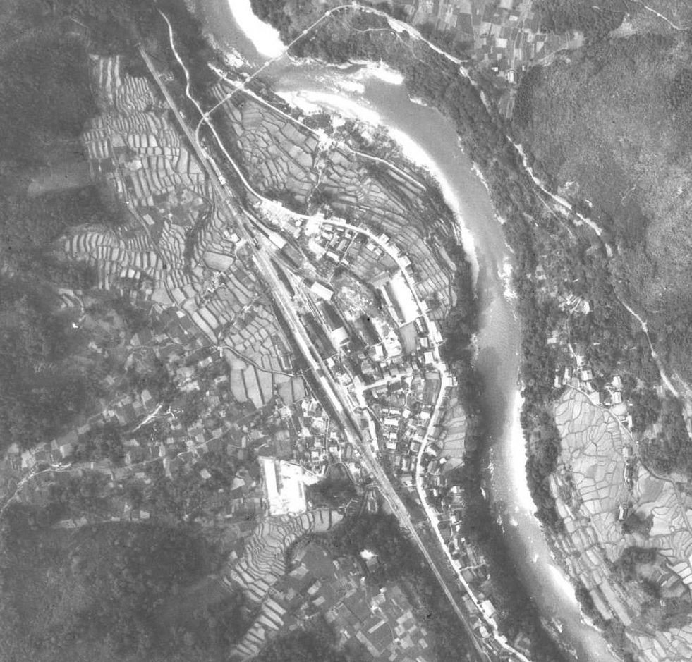 昭和23年9月19日撮影の猪谷駅周辺航空写真